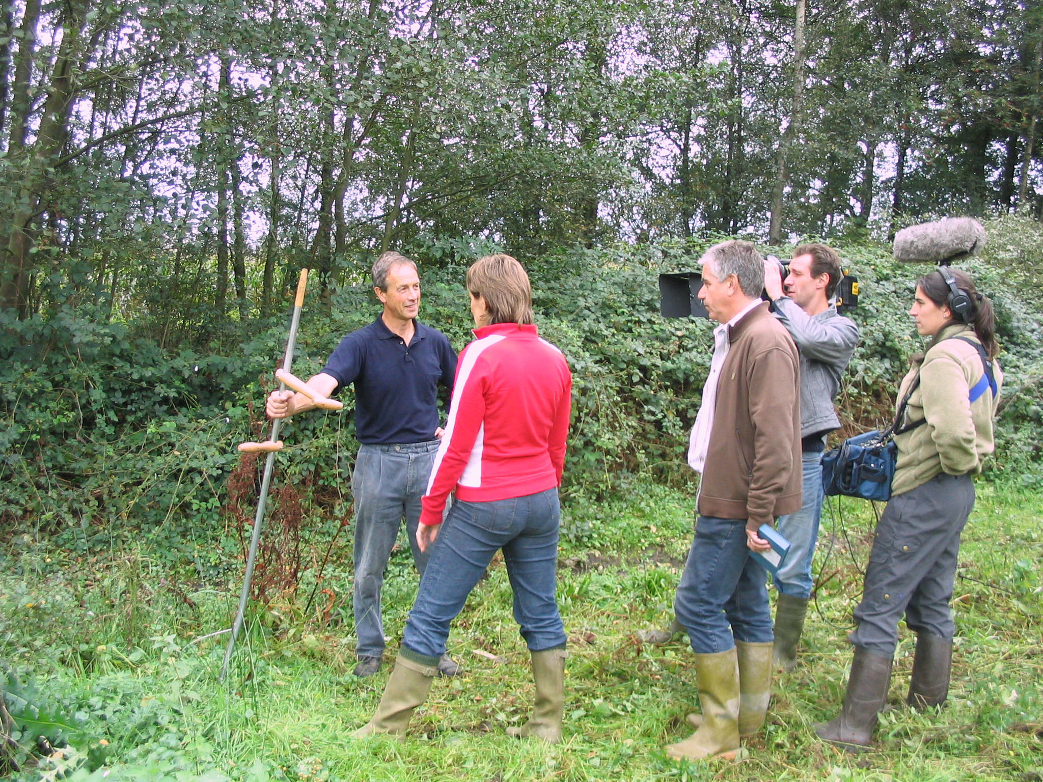 TV-opname